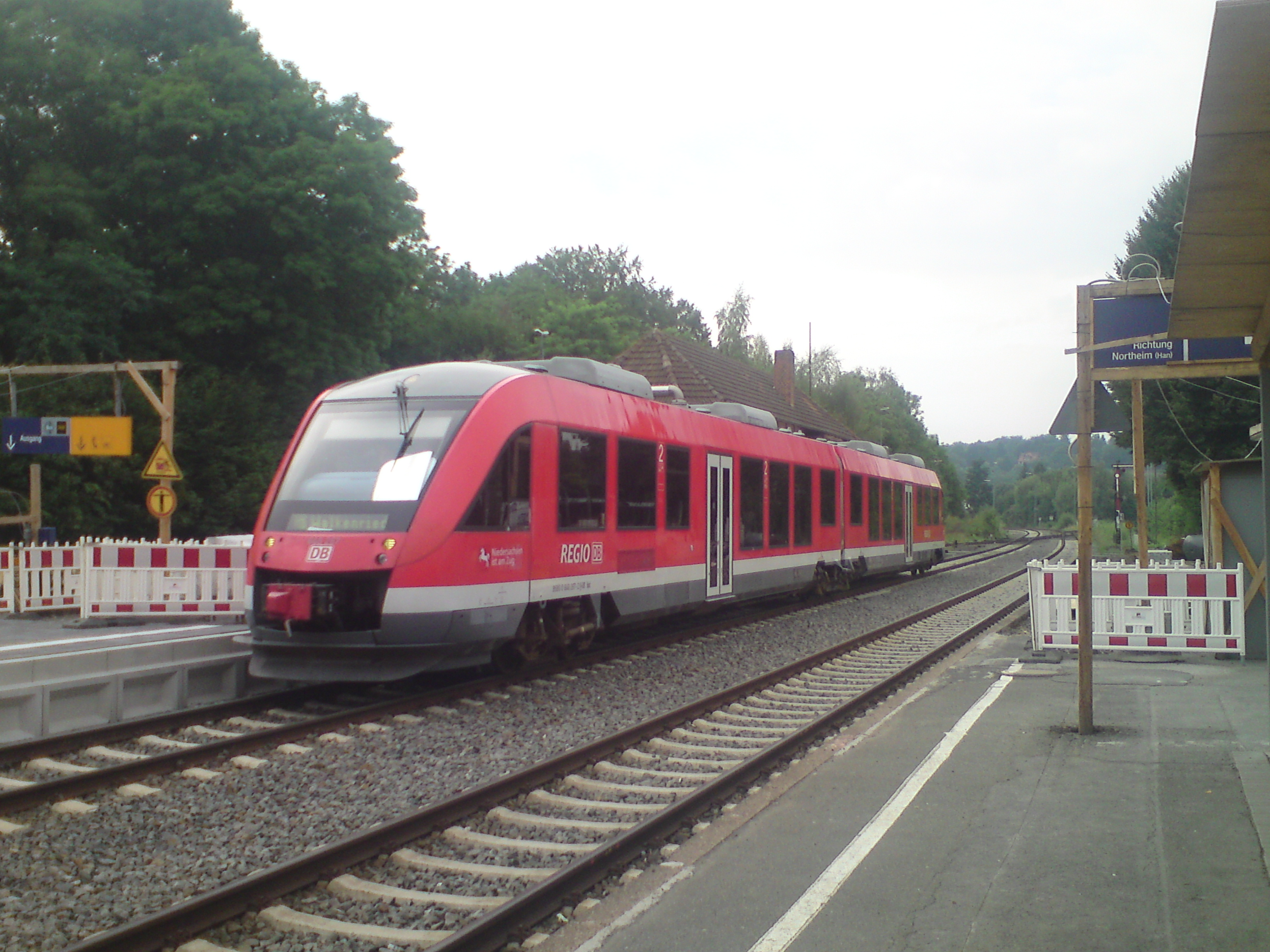 Vom Mittelbahnsteig aus fotografiert, im Hintergrund das Stellwerk